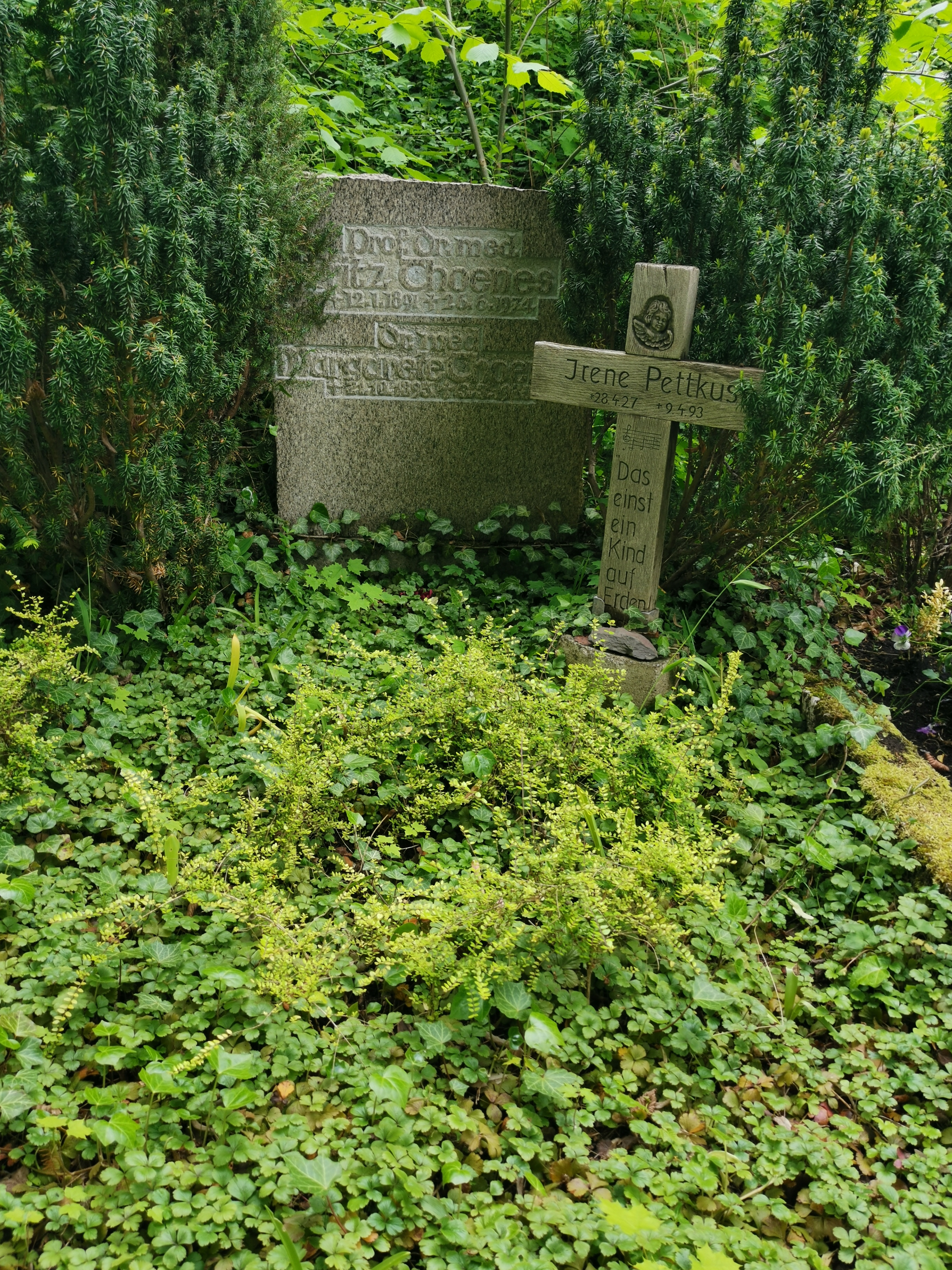 Grab Prof. Fritz Thoenes, Historischer Friedhof Weimar